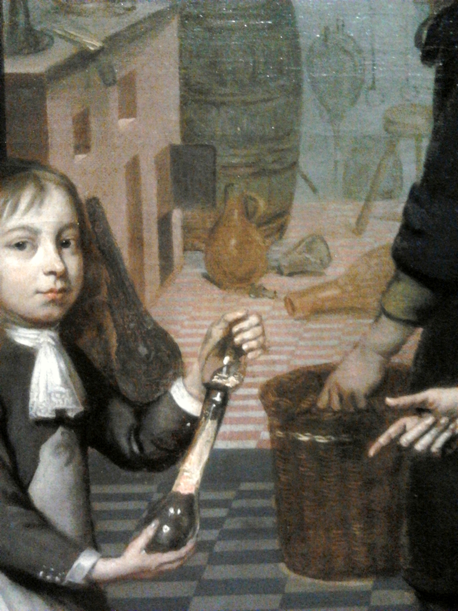 detail